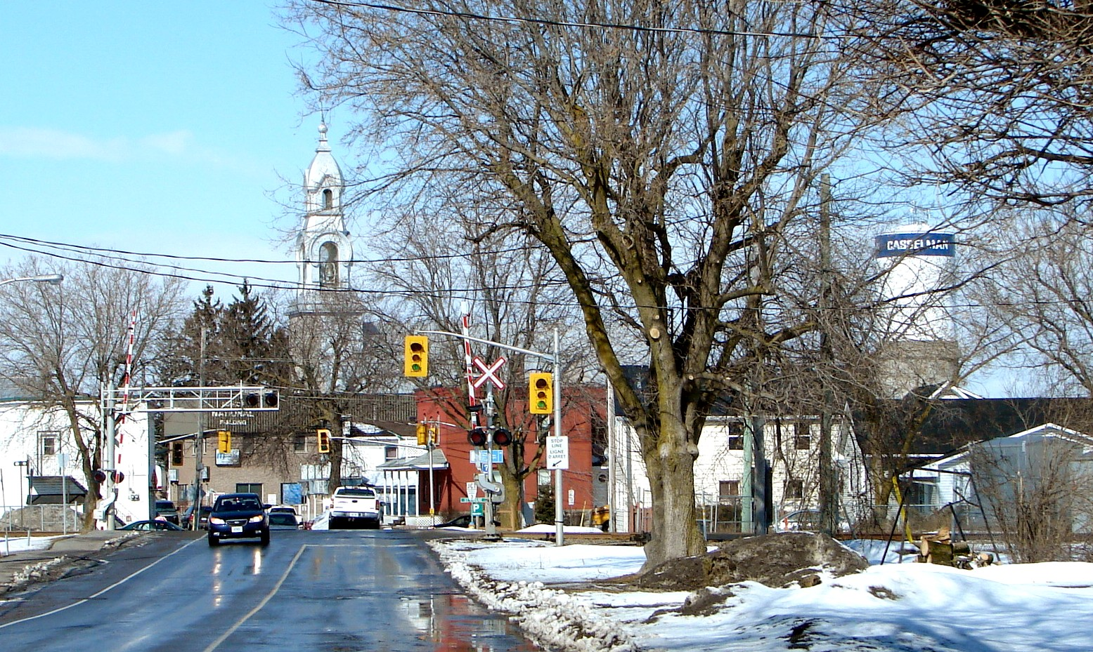 Casselman, Ontario, Canada